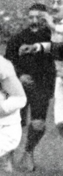 Henri Amand, arbitre de la finale de rugby 1913 Bayonne - SCUF